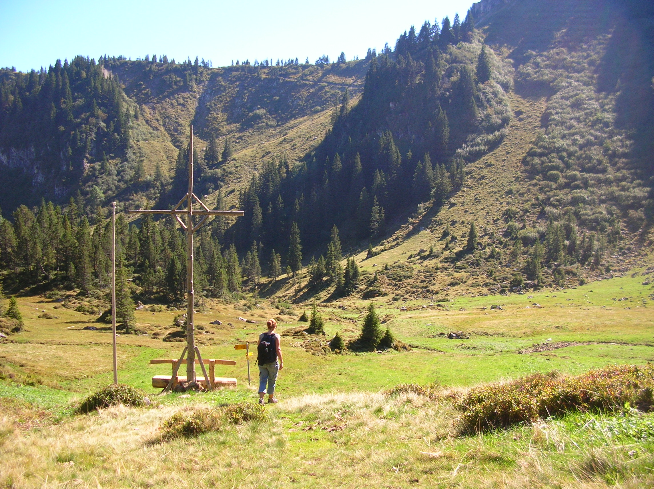 Ehemaliger Pilatussee